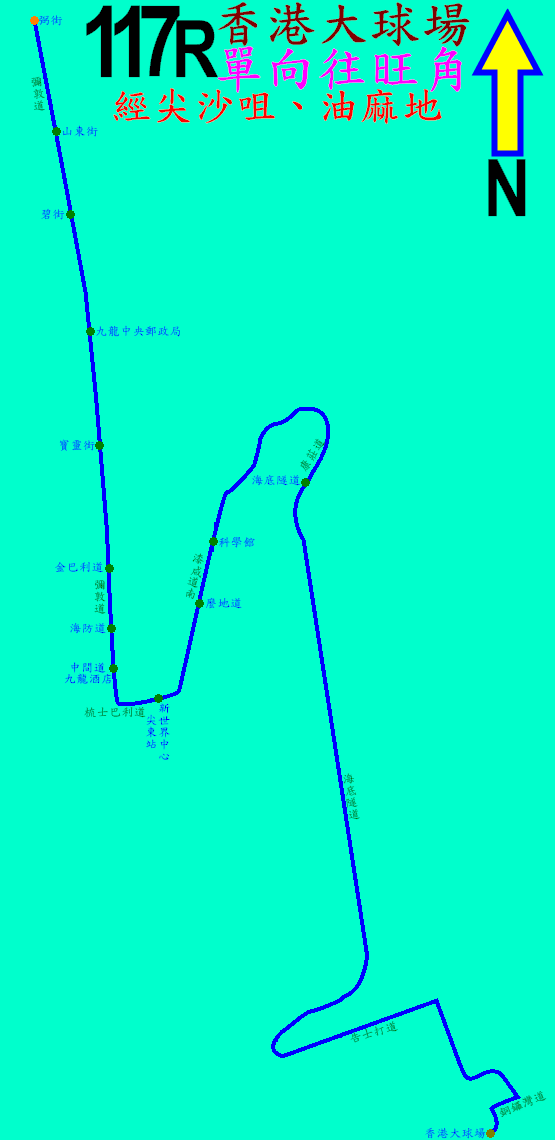 中文（香港）: 過海隧巴117R線的走線圖